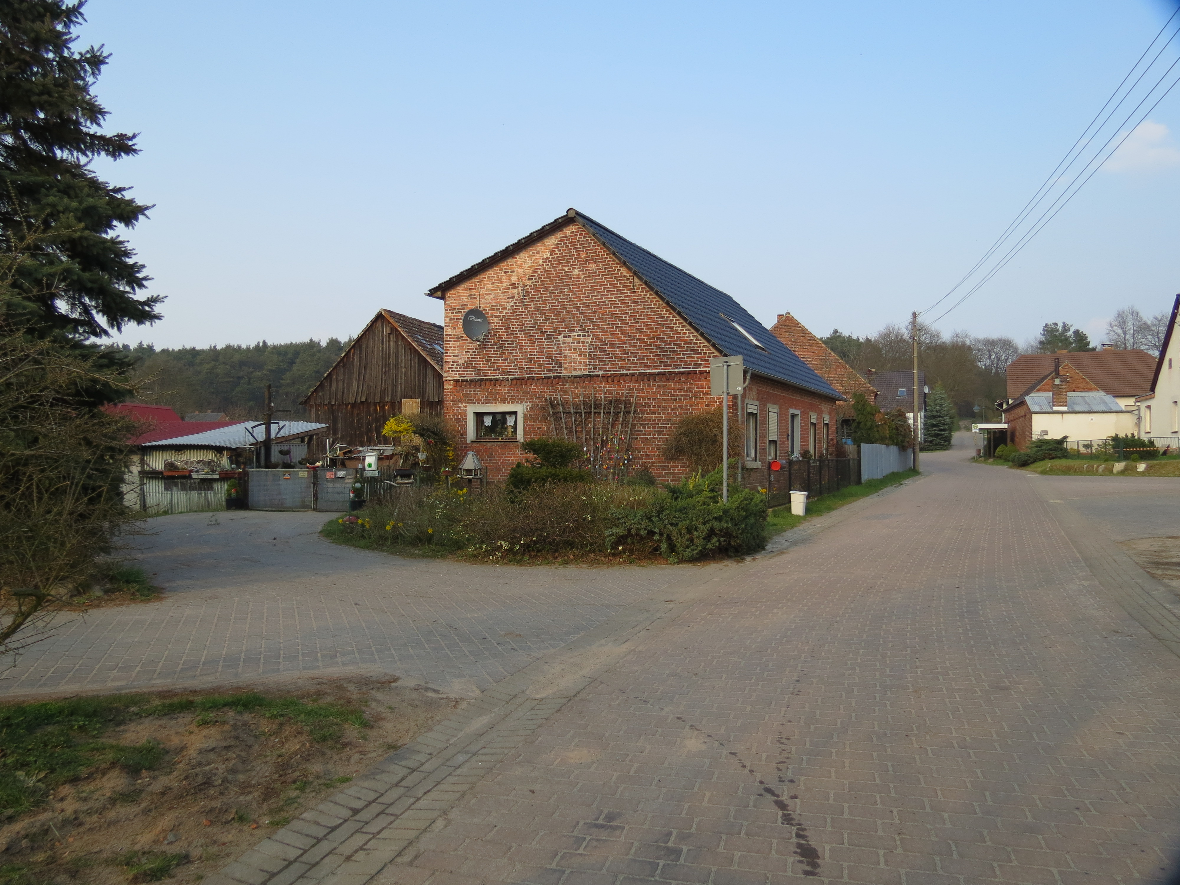 Mochlitzer Dorfstrasse, Mochlitz, Gemeindeteil der Gemeinde Jamlitz, Lkr. Dahme-Spreewald, Brandenburg, Deutschland